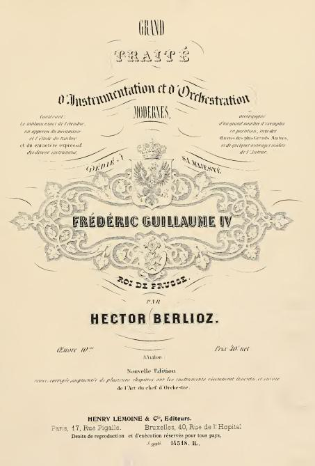 Berlioz - Page de titre du traité d'instrumentation